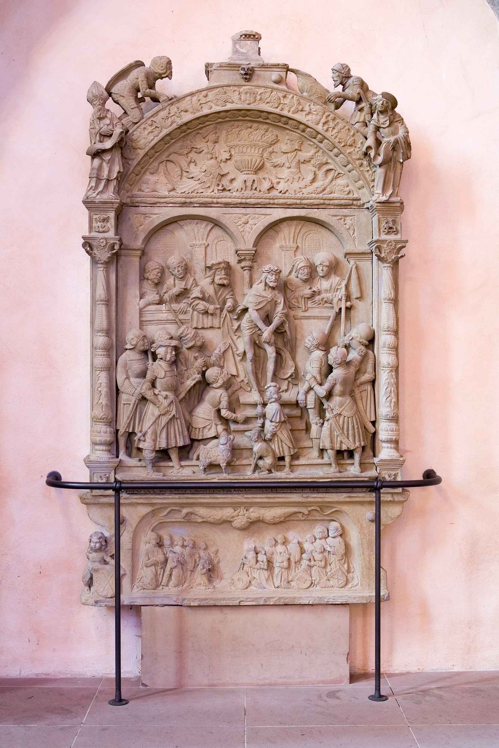 Im Stil der flämischen Frührenaissance gestalteter Epitaph des 1518 verstorbenen Ratsherren Andreas Hirde im Kaiserdom St. Bartholomäus in Frankfurt am Main. Selber fotografiert im Februar 2008, Doppellizensierung GFDL & CC-BY-SA 2.5.